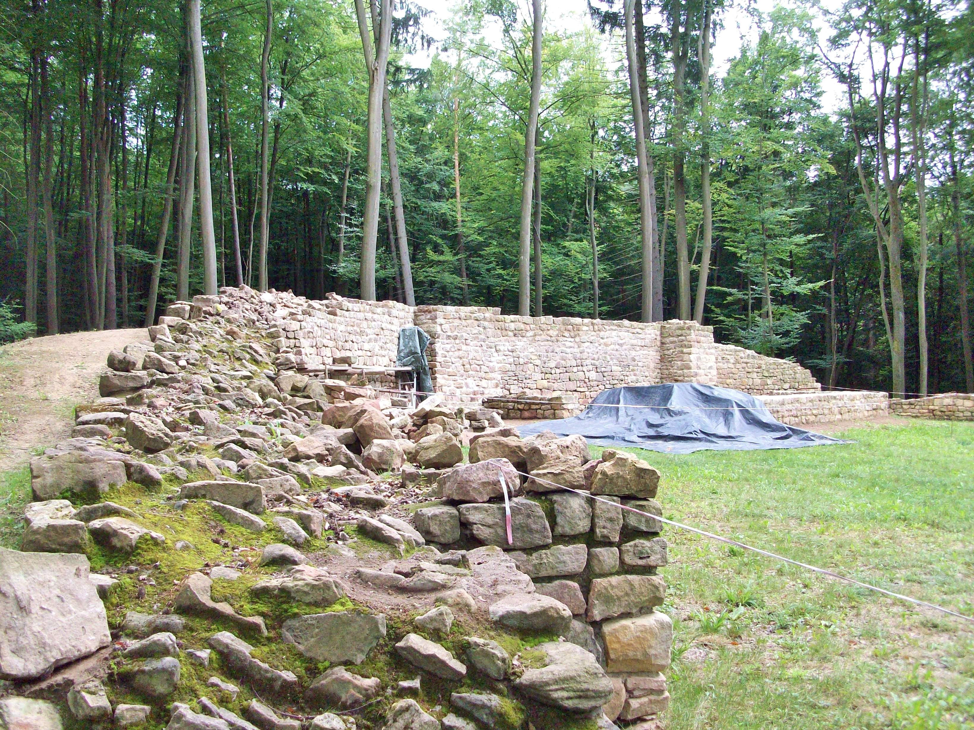 Die teilweise freigelegte und rekonstruierte Wehrmauer der Burganlage Waleberg (Altes Schloss) im Gemeindewald von Kleinwallstadt